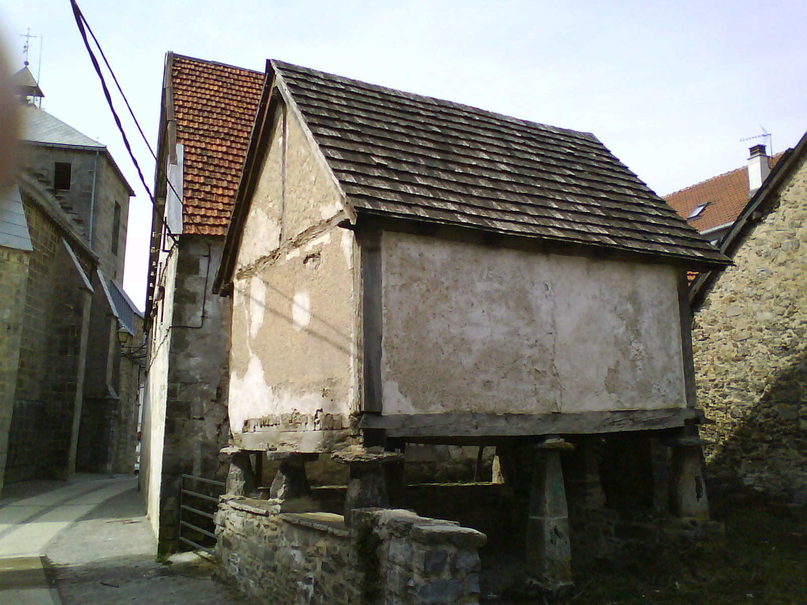 Orbaizetako garaia.